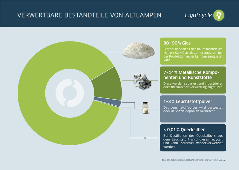 Diese verschiedene Bestandteile von Energiesparlampen sind verwertbar.